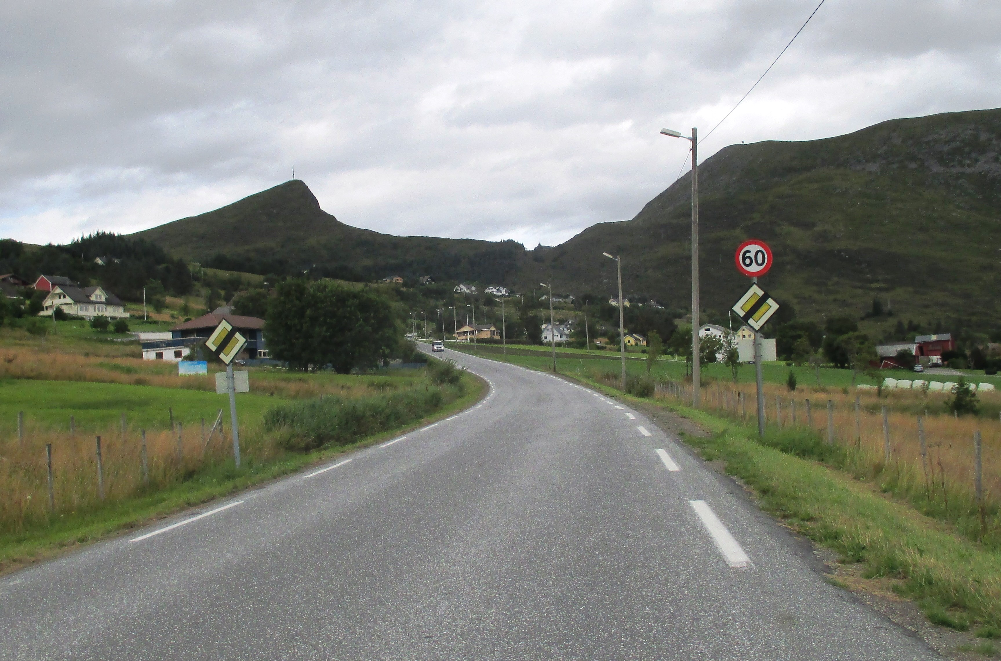 Fylkesvei 632 i utkanten av Leikanger i Selje